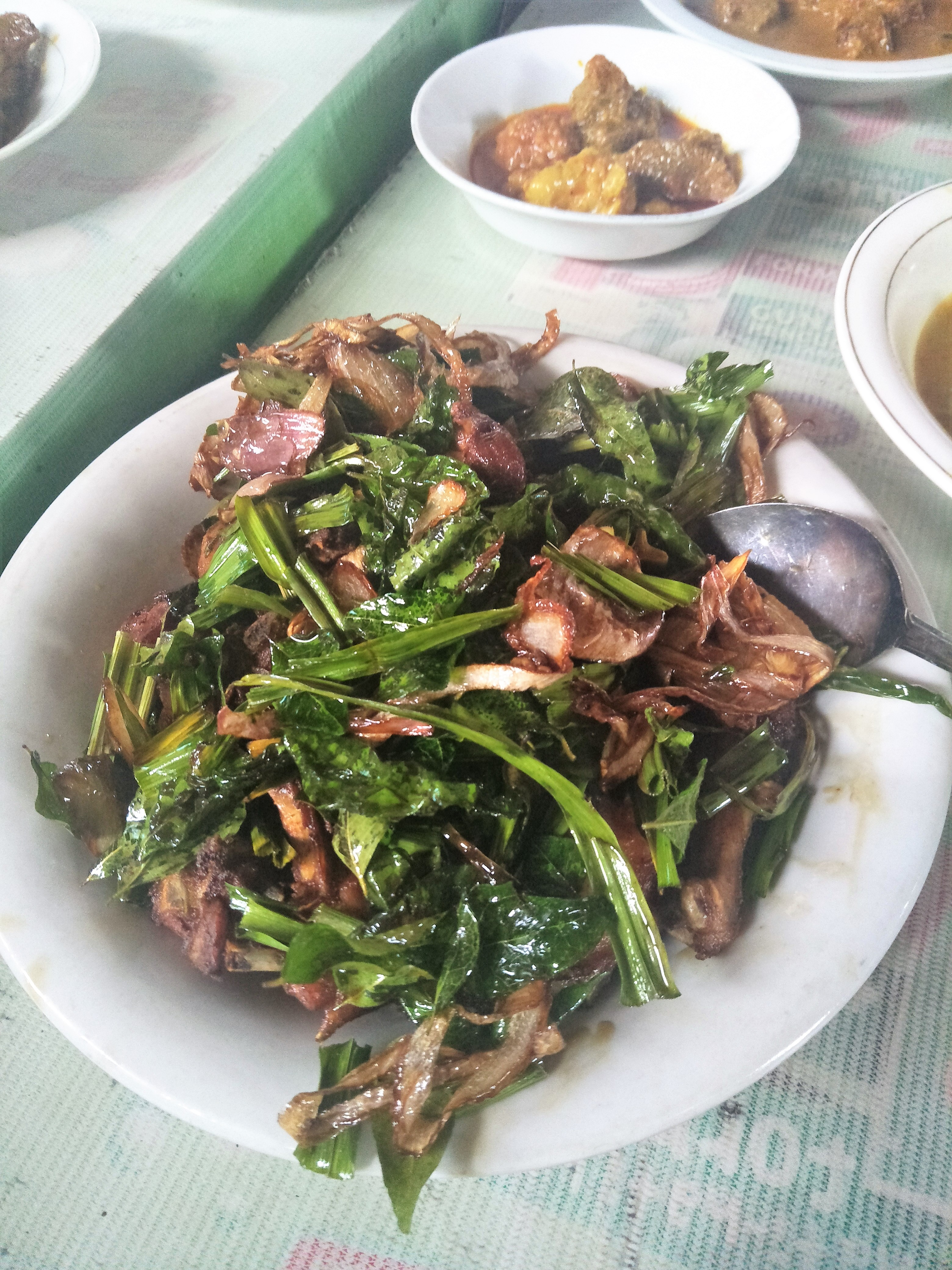 Ayam tangkap masakan khas Aceh yang terdiri dari ayam, daun kari, daun pandan, bawang bombay goreng dan bumbu lainya.